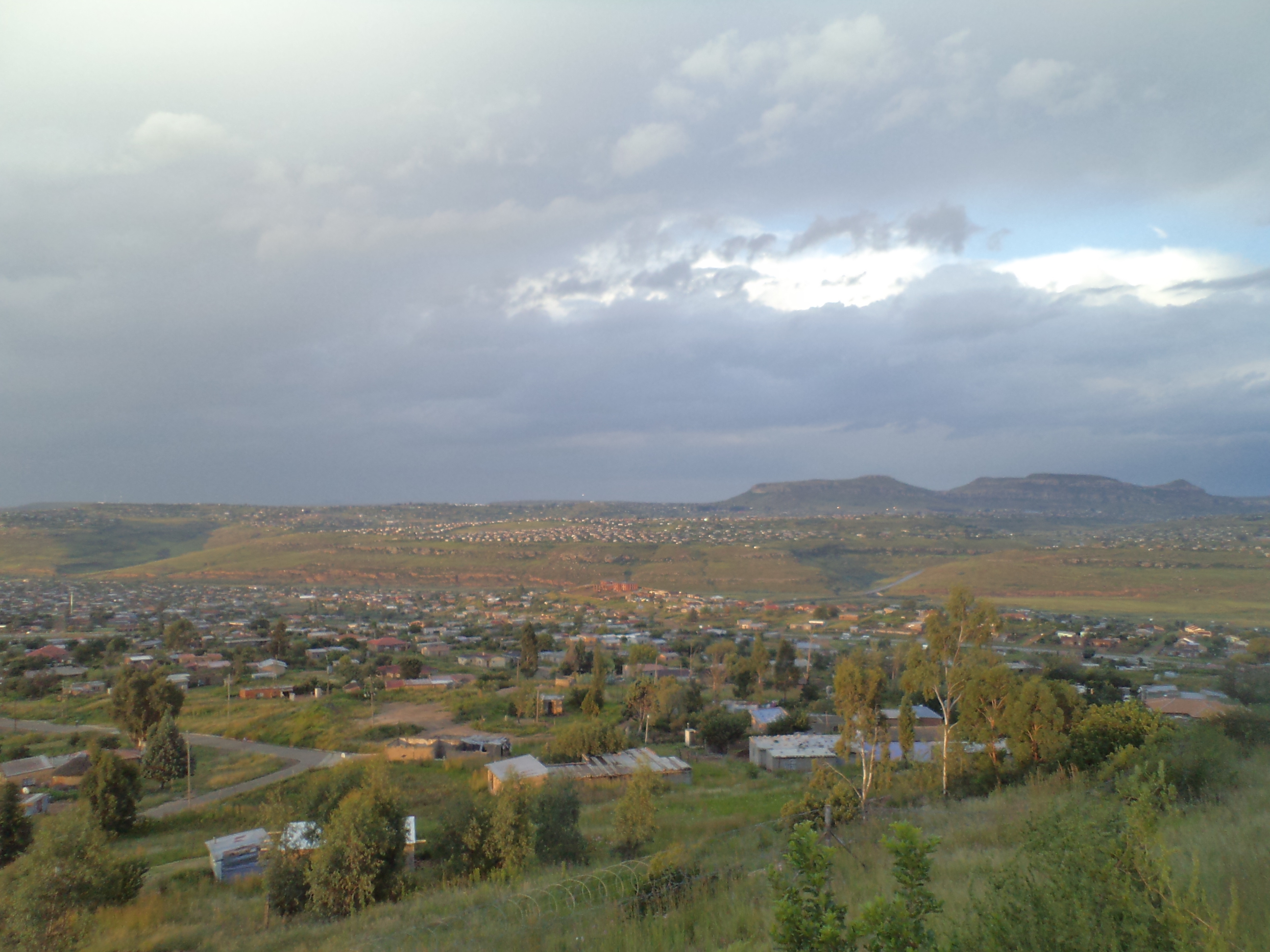 Qwaqwa was genoem na Witsieshoek lank terug